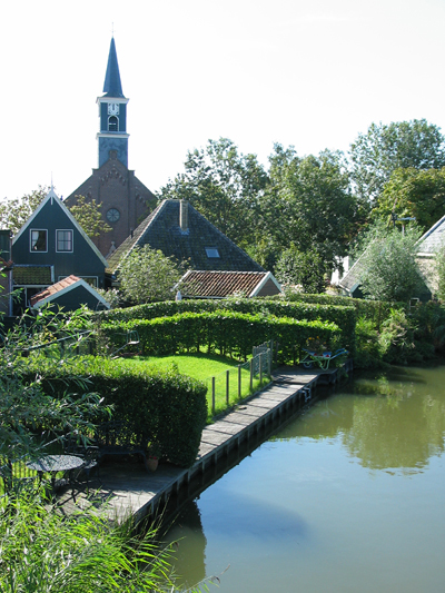 Eigen werk, Gerard Hogervorst.